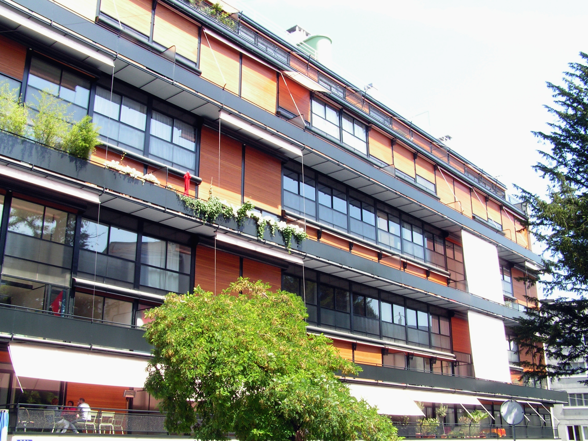 Rue Saint-Laurent 2-4, Genève. Immeuble Clarté.